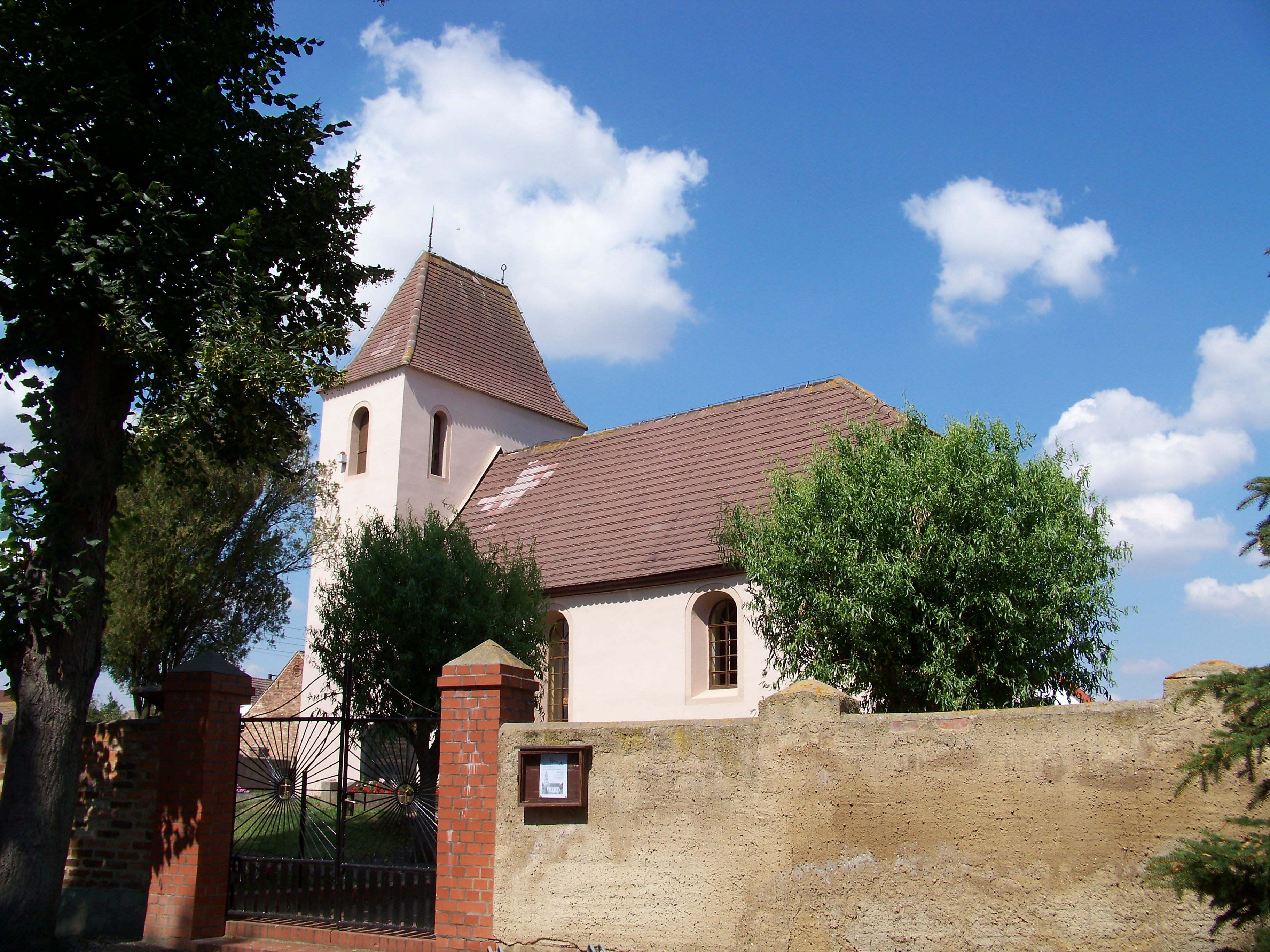 Kirche in Dörstewitz, einem Ortsteil der Gemeinde Schkopau in Sachsen-Anhalt